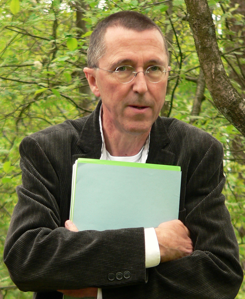 LWL-Archäologe Michael Rind beim Römerlager Bielefeld